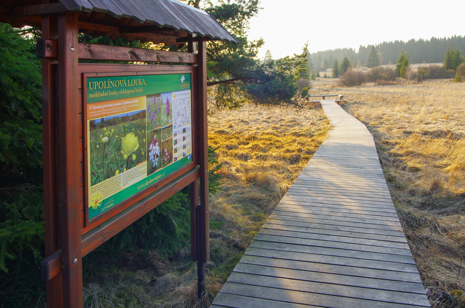 Upolínová louka pod Křížky, Slavkovský les, okres Cheb